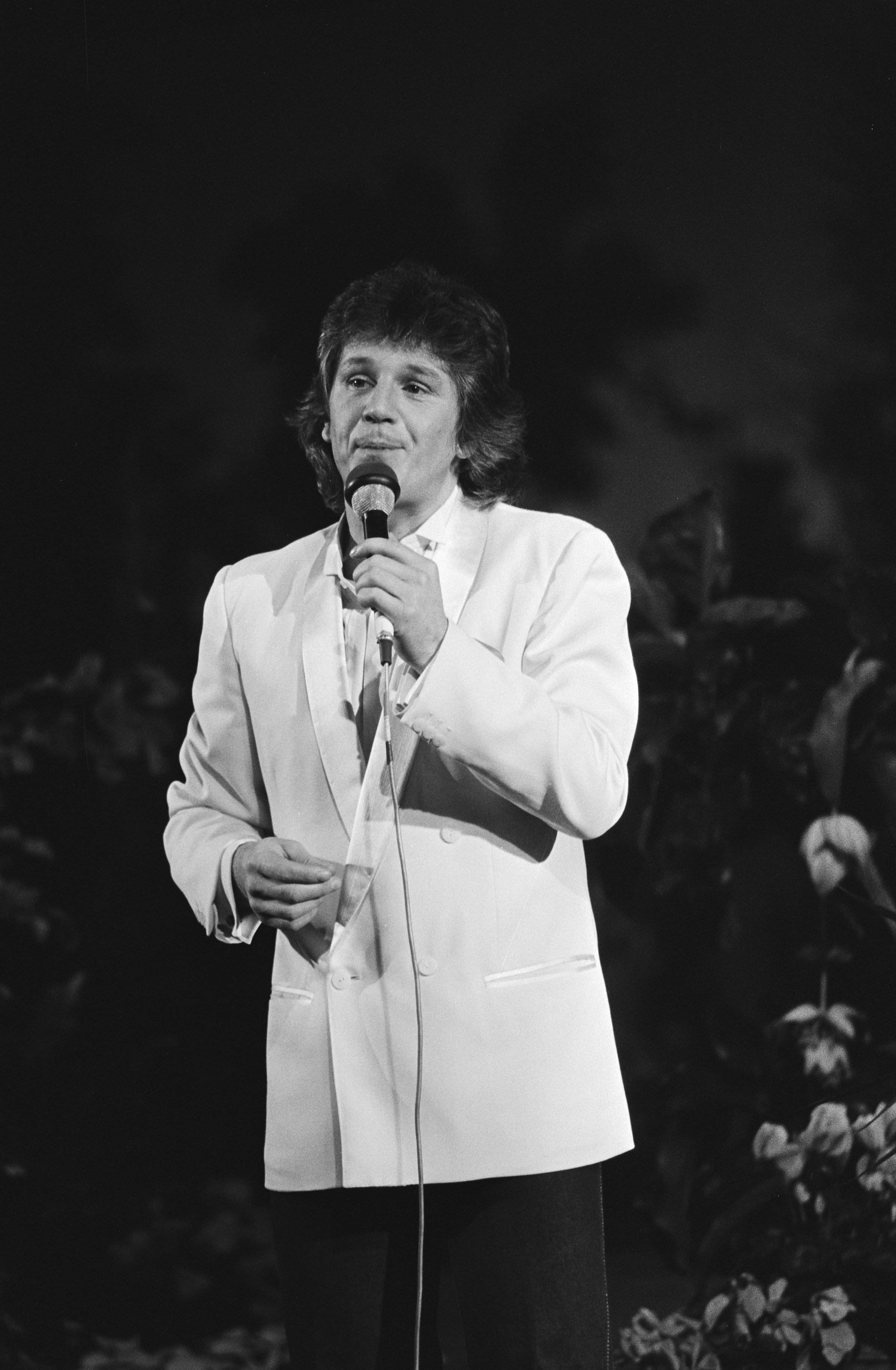 Gérard Lenorman tijdens het Bloemengala Rijnsburg in 1982 ten bate van het Wereld Natuur Fonds